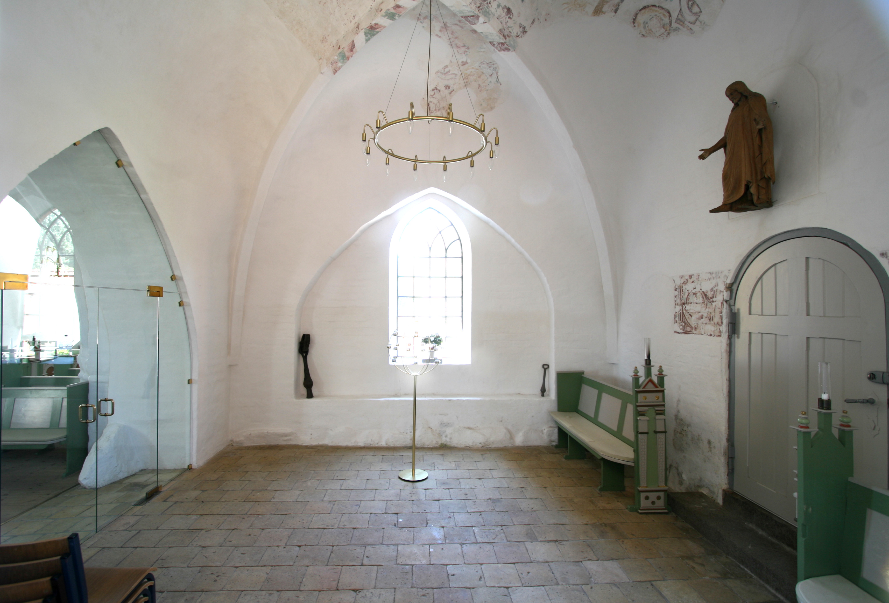 Ølsemagle Kirke, near Køge, Denmark. Interior of chapel.